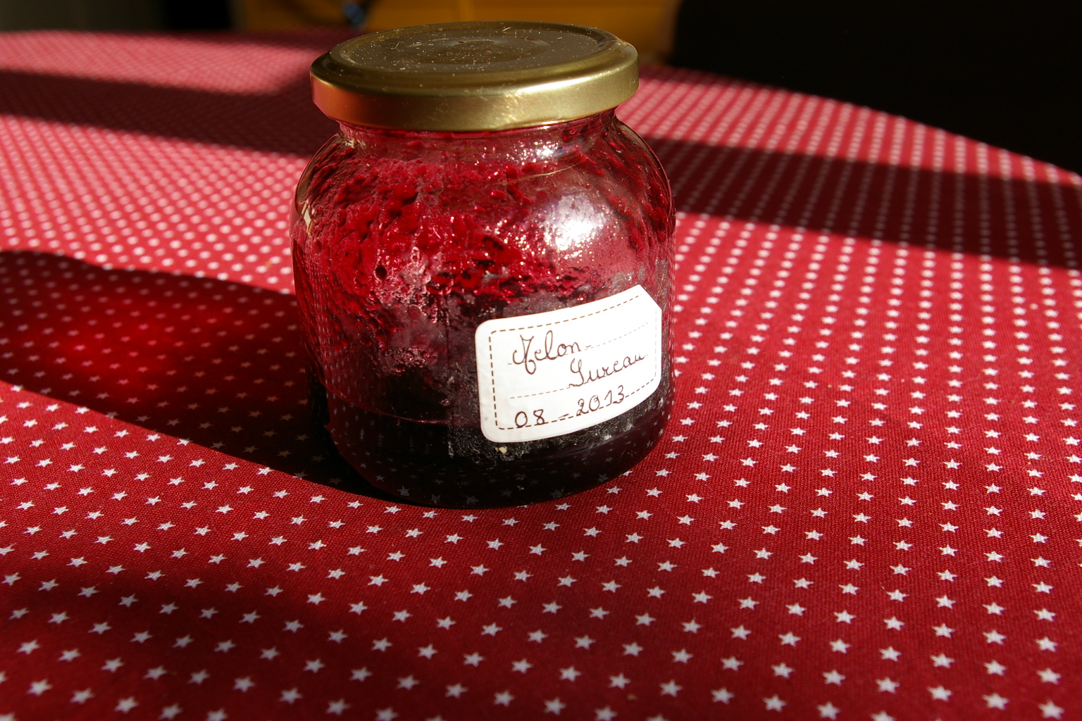 confiture de sureau